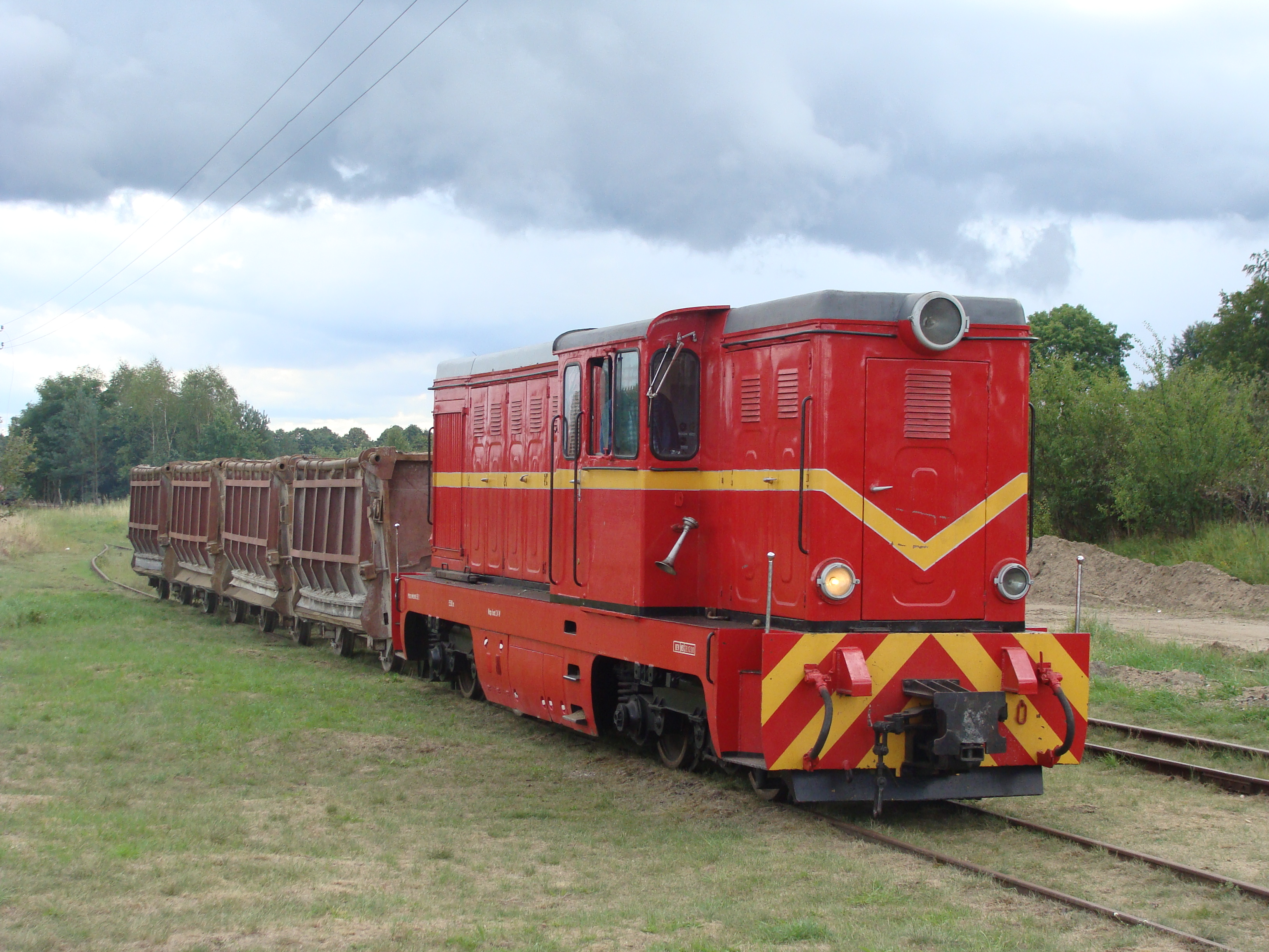 L45H 24844 z pociągiem roboczym na stacji w Manowie